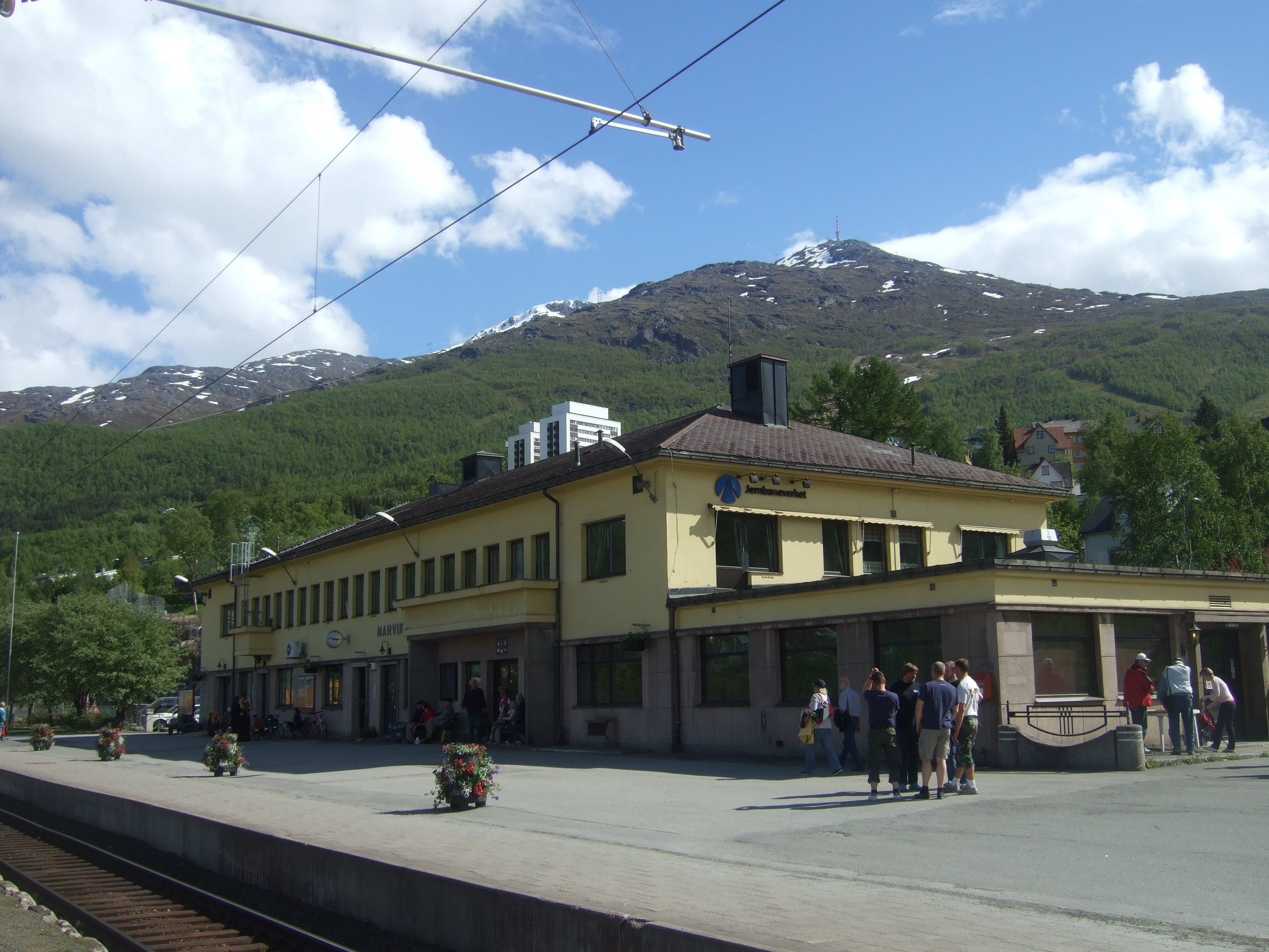 Narvik railroad station